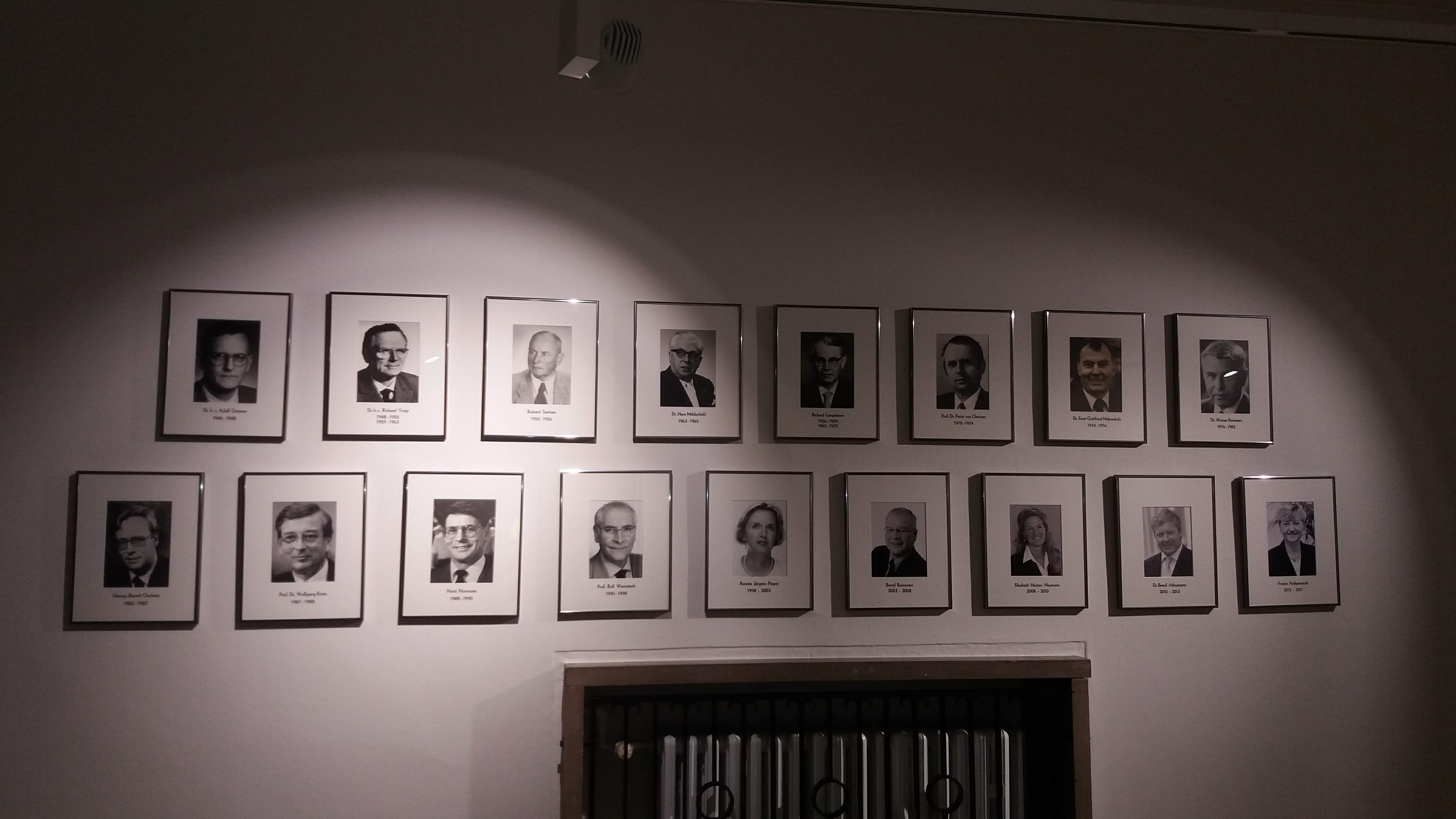 Die Galerie der Niedersächsichen Kultusminister hängt im bisherigen Gebäude des Niedersächsischen Kultusministeriums am Schiffgraben 12 in Hannover. In unmittelbarer Nähe befand sich das Ministerbüro. Die Galerie beginnt mit Adolf Grimme (Minister von 1946 bis 1948, oben links) und endet mit Frauke Heiligenstadt ) Ministerin von 2013 bis 2017, unten rechts).